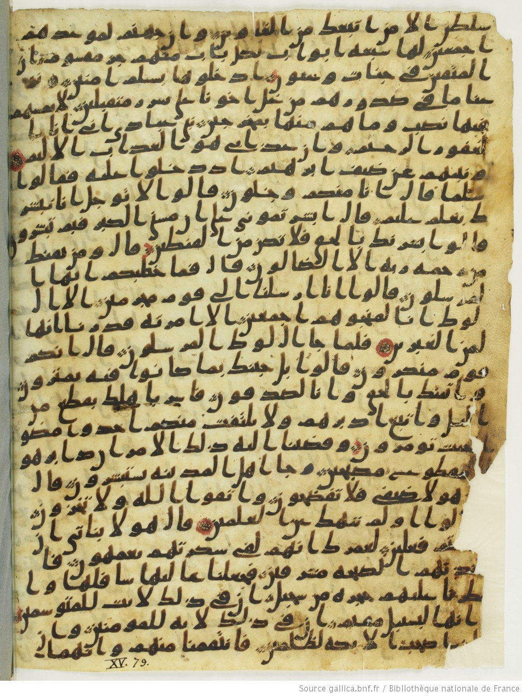 Collection de feuillets coraniques (VIIe-Xe s.) de Jean-Louis Asselin de Cherville, agent consulaire en Egypte